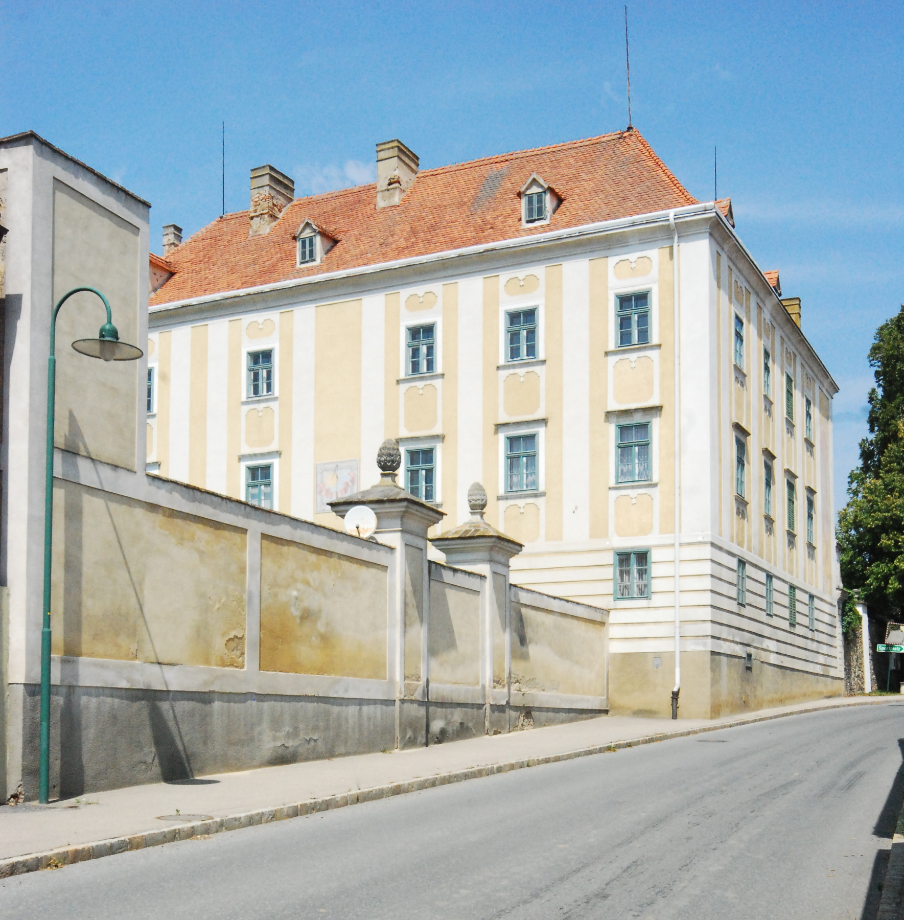 Neues Schloss Breiteneich